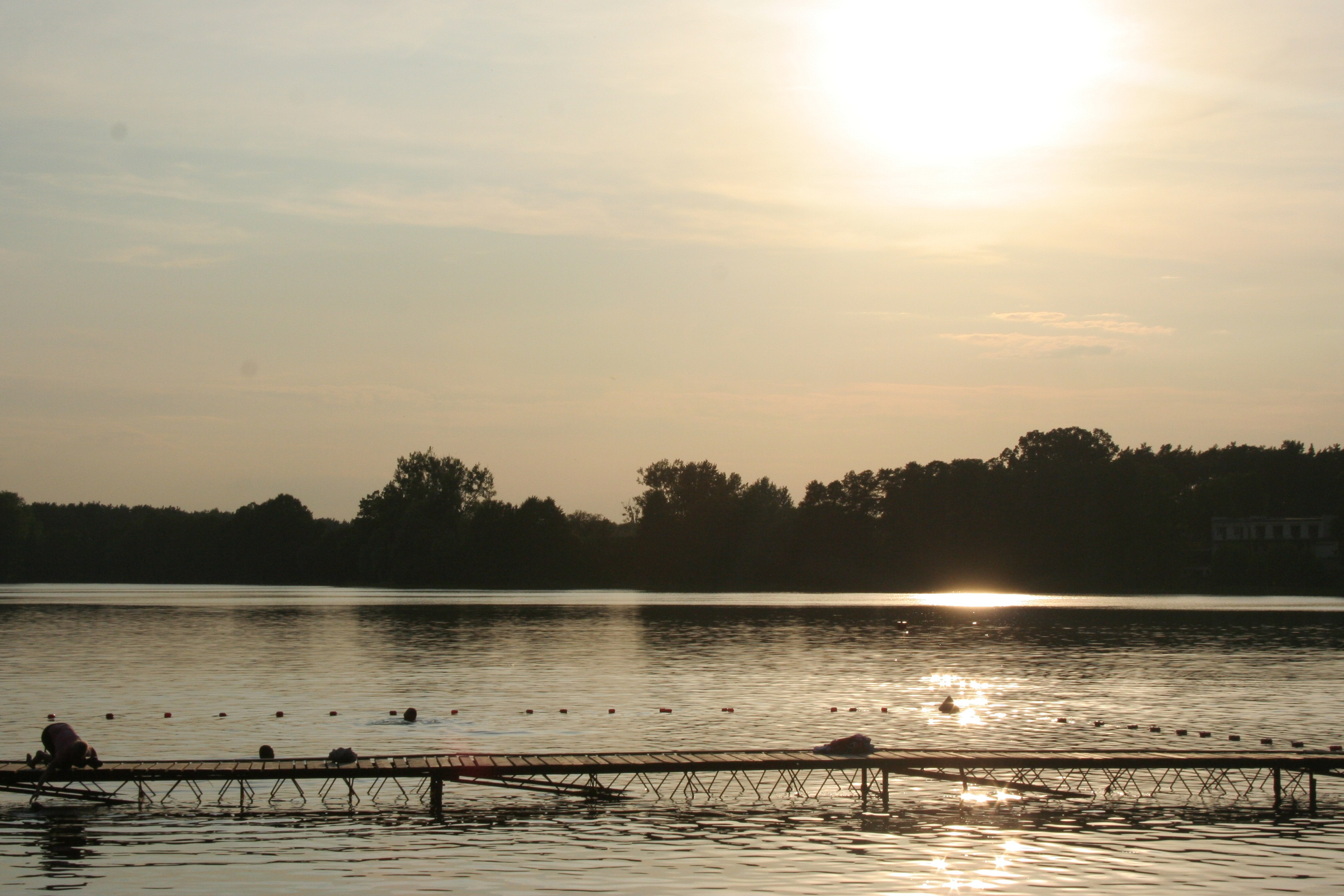 Jezioro Sarcz w Trzciance.